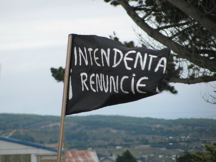 Foto de Francisca Bitsch Vukasović